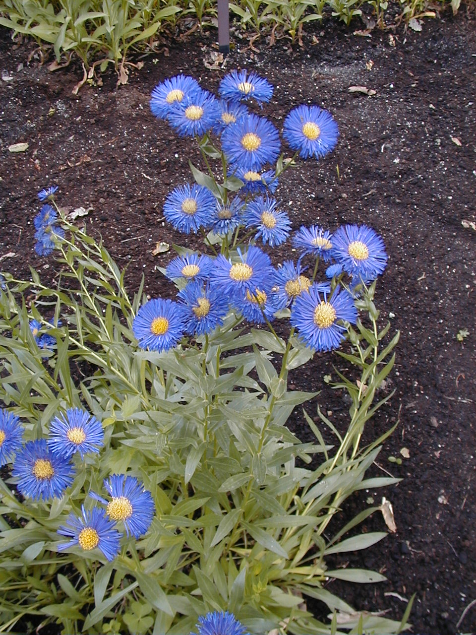 Erigeron speciosus. Real Jardín Botánico de Madrid